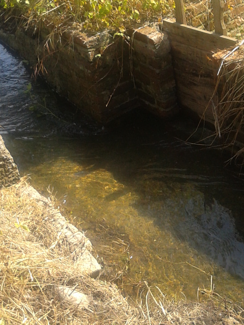 Roggia "Riale" di Parabiago This is a photo of a monument which is part of cultural heritage of Italy.